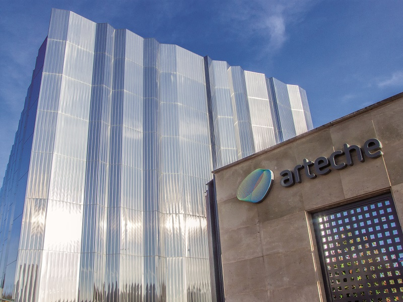 Sede de Arteche en Mungia